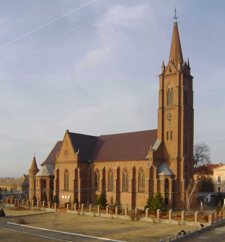 Pécskai Római Katolikus Templom, készítette és közlését engedélyezte Nagy István, Pécska.